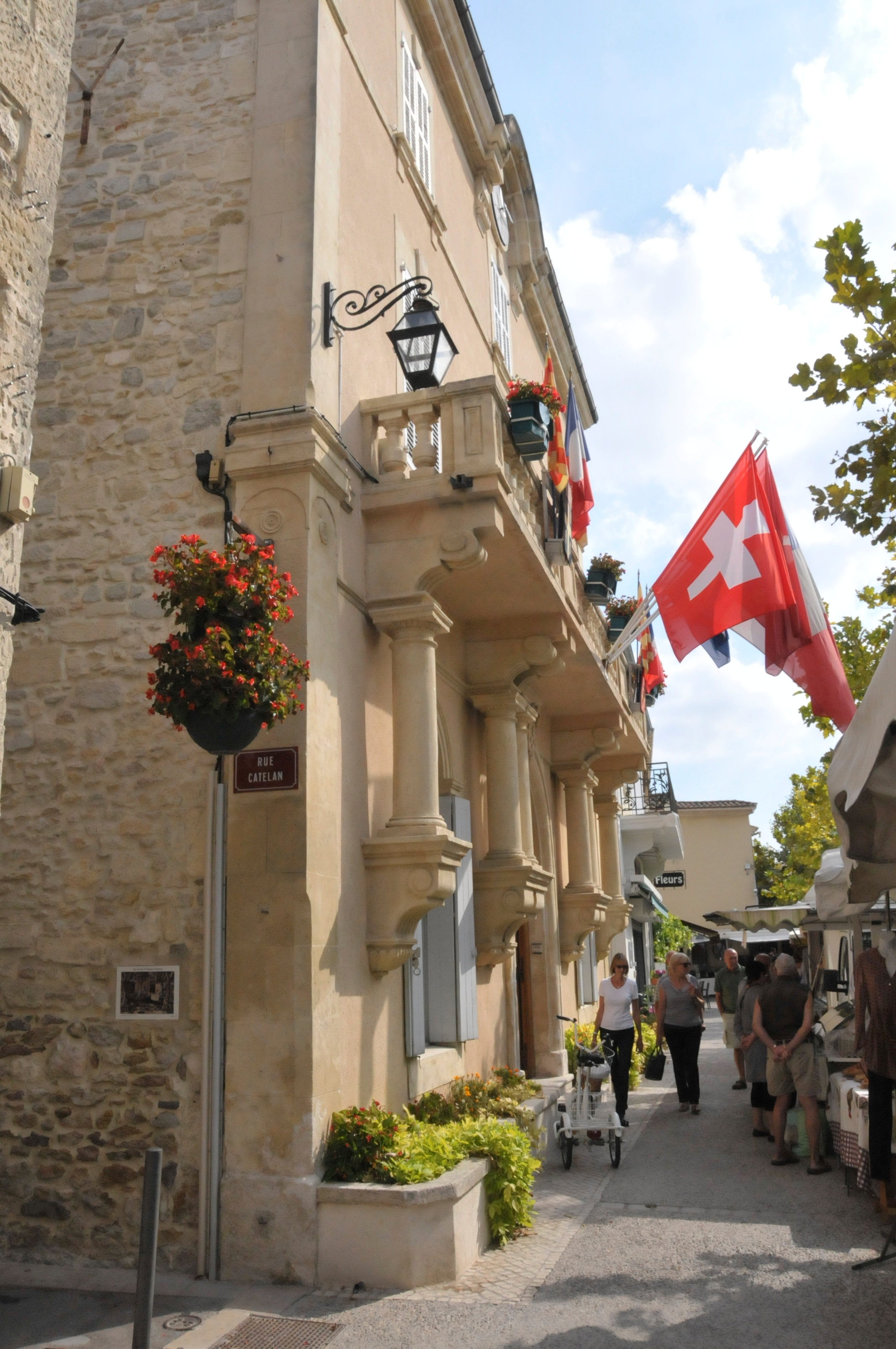 Maierie (Gemeindeverwaltung) in Graveson